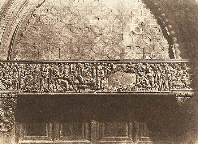 Bas relief, Porte d'Entrée, Saint Sepulcre, Jerusalem.